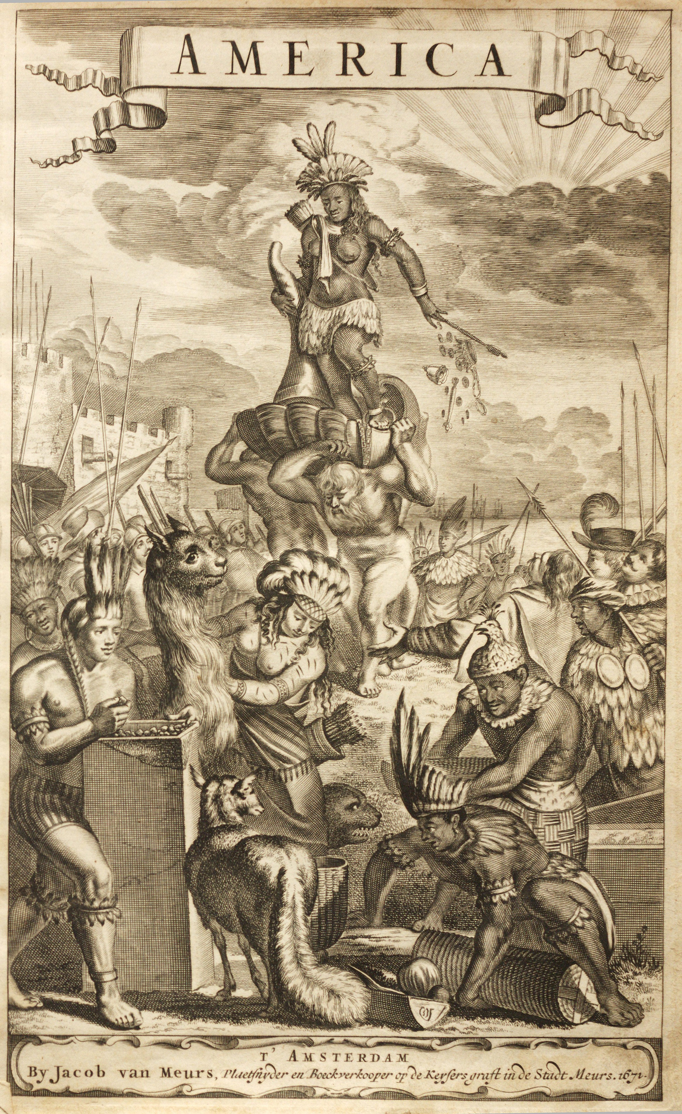 Abbildung "America" aus einem Buch